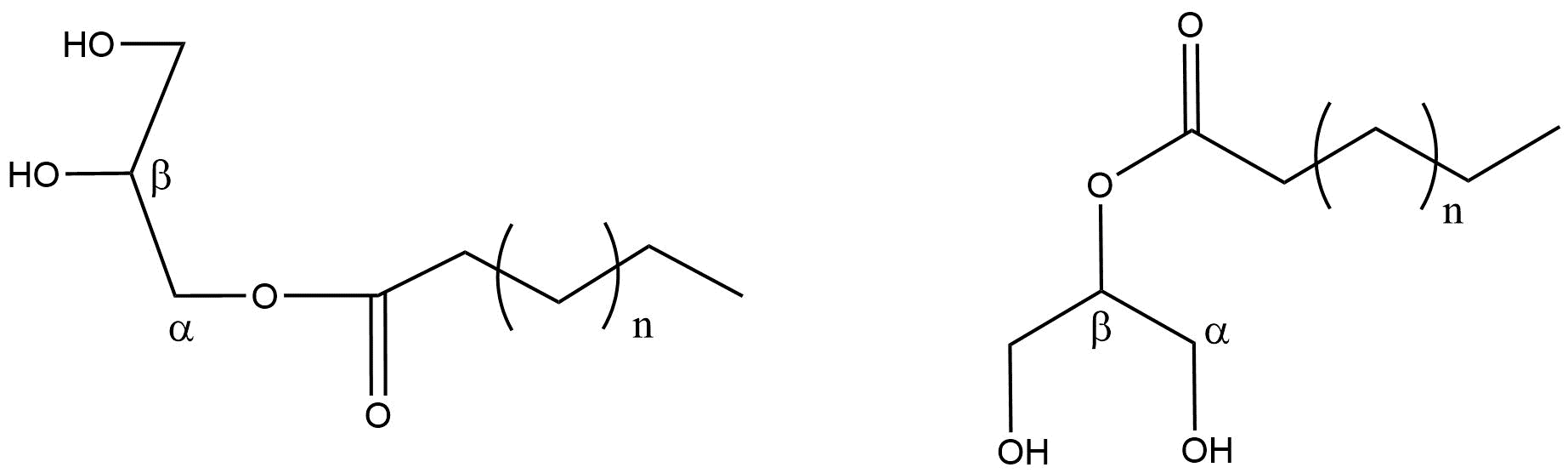 Dependendo de com qual hidroxila (grupo –OH) da glicerina o ácido esteárico reage, o MEG pode ser chamado de alfa ou beta. À esquerda, o α-MEG, à direita o β-MEG. Também é possível encontrar o di ou triestearato, em que duas ou três hidroxilas foram substituídas por estearato.